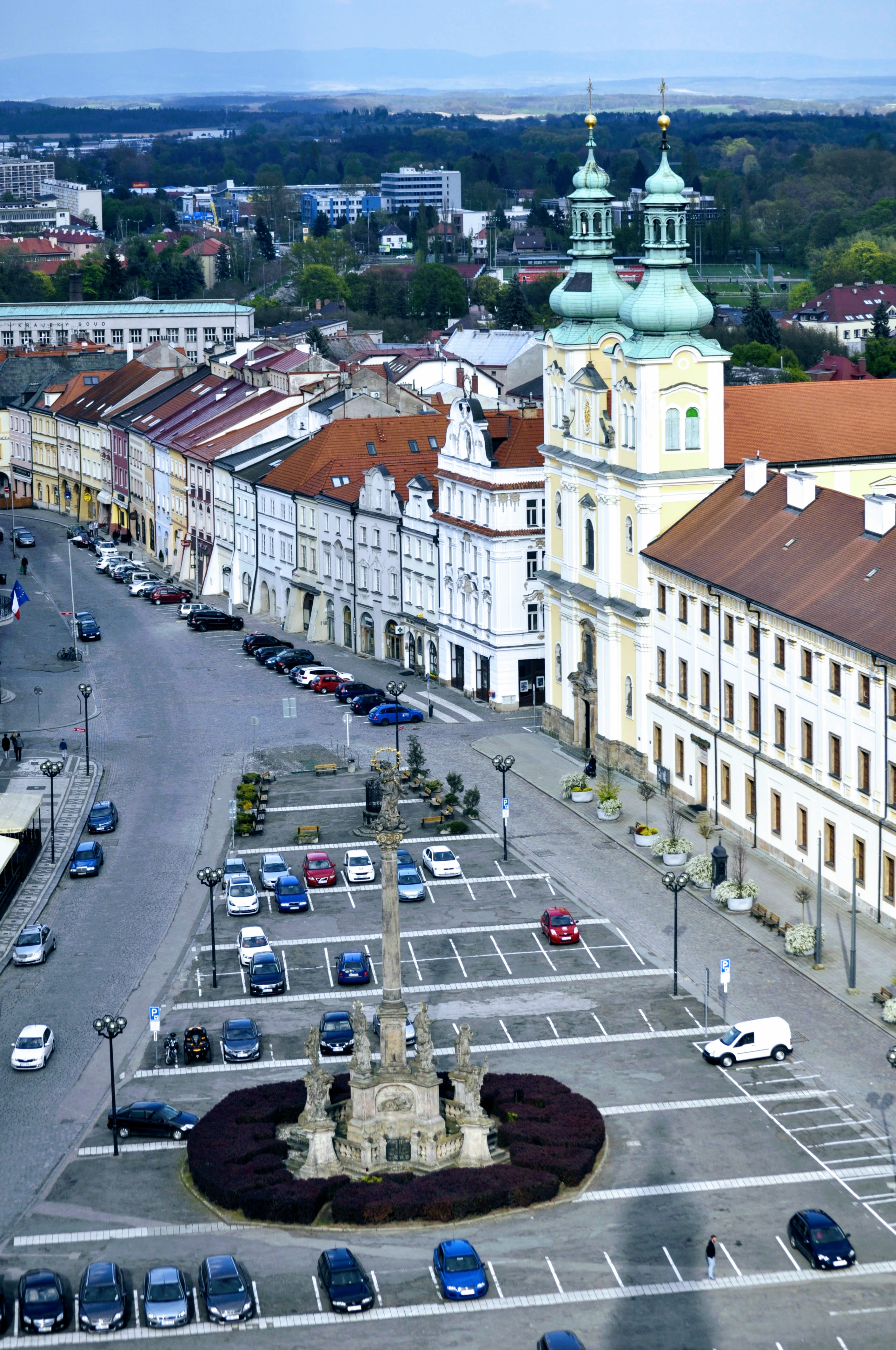 Kostel Nanebevzetí Panny Marie